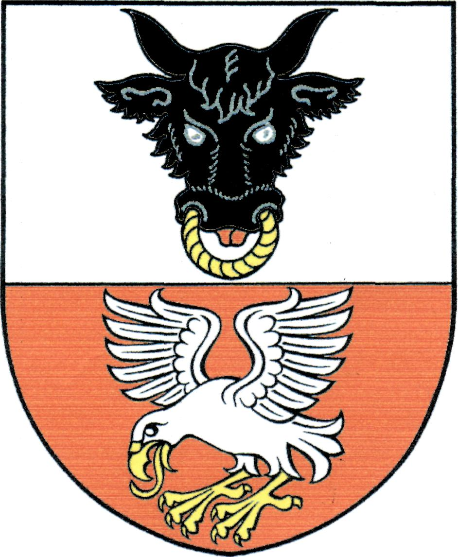 Znak obce Pernštejnské Jestřabí